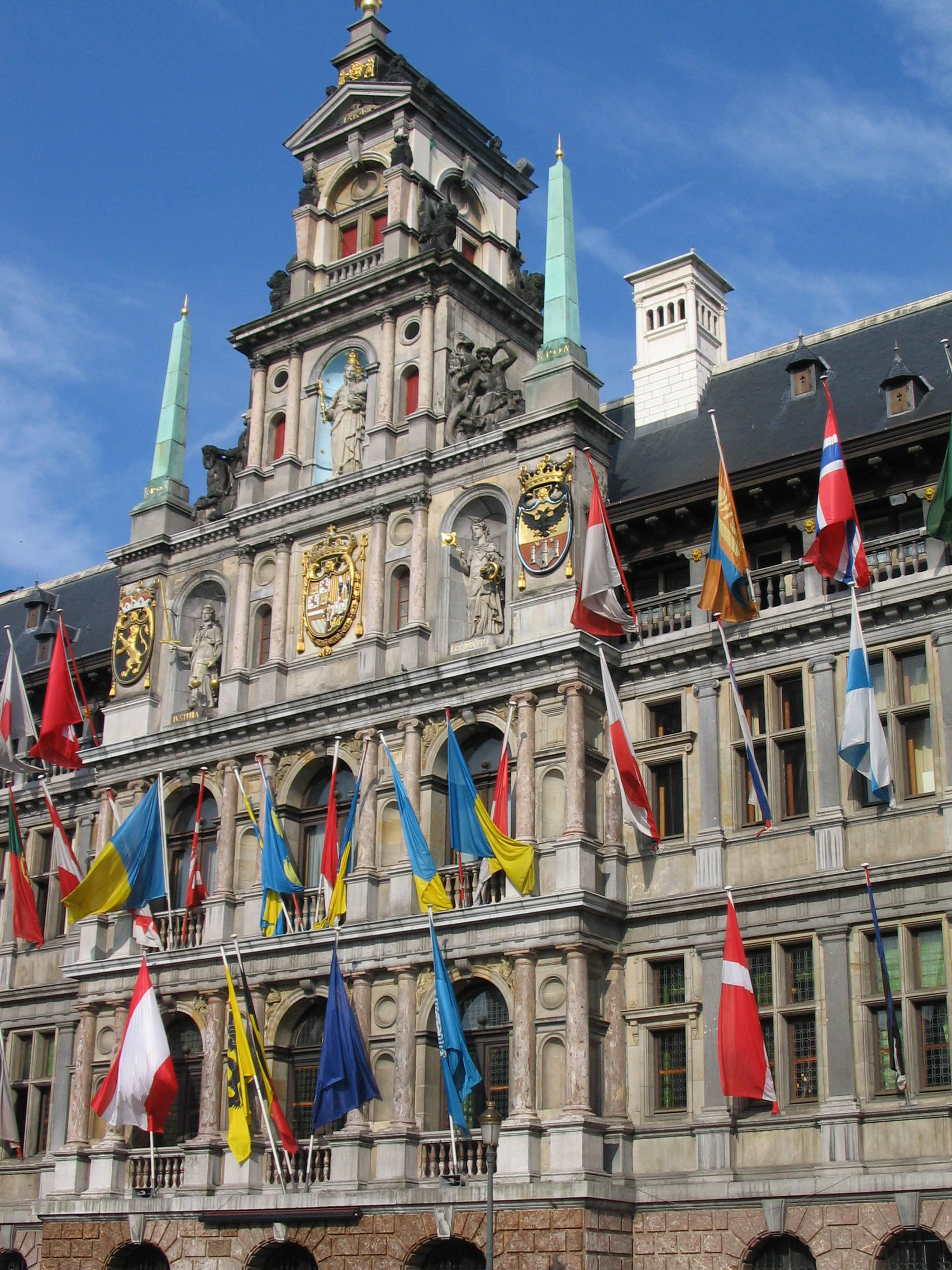 Détail façade Hôtel de Ville, Grand Place (Grote Markt) -- Anvers, Belgique.